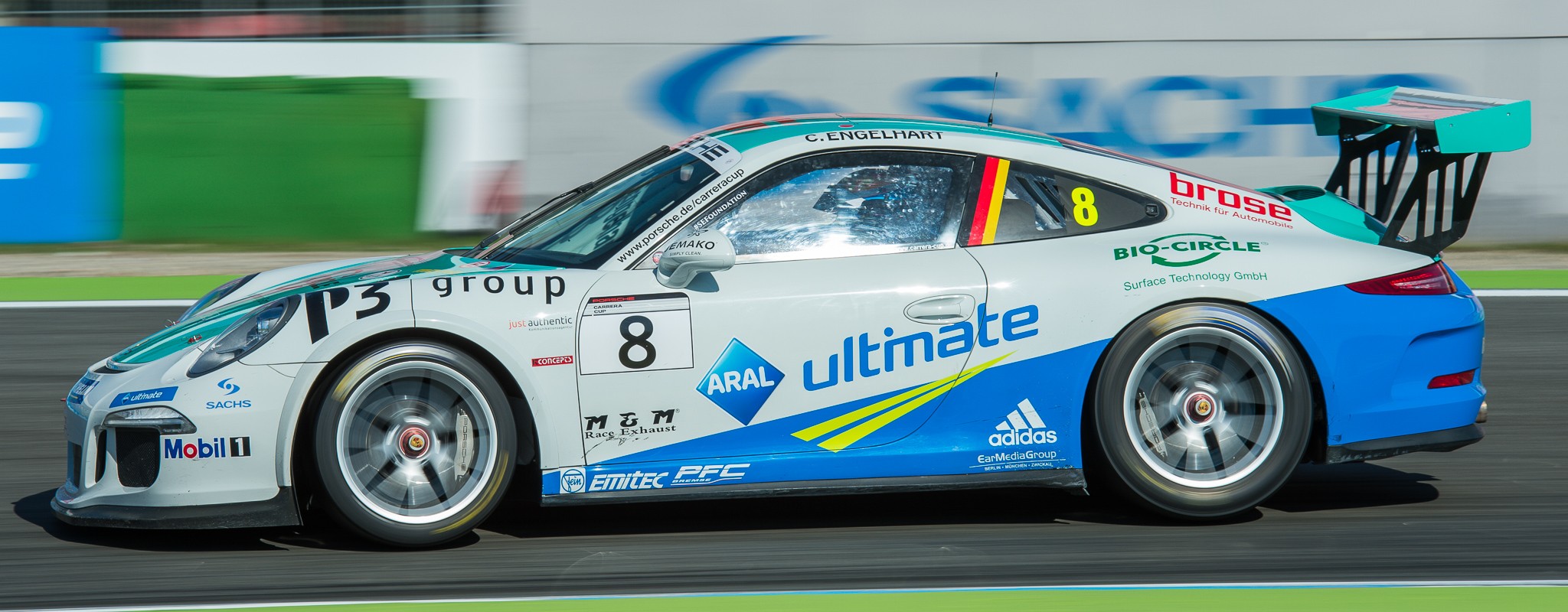 Christian Engelhart,Hockenheimring,Konrad Motorsport,Motorsport,Porsche 911 GT3 Cup (Typ 991),Porsche Carrera Cup Deutschland